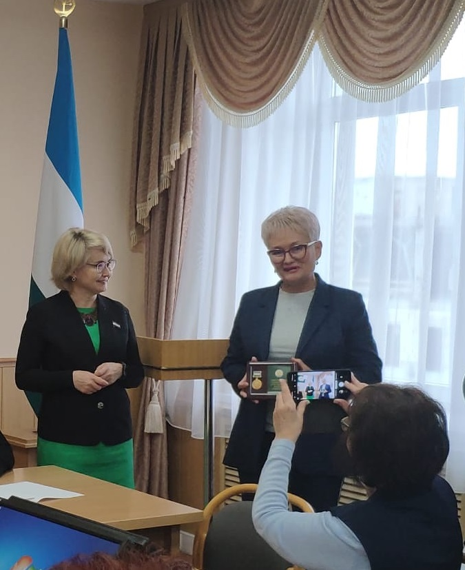 Парфенова Светлана Рафатовна, общественный и научный деятель. Уфа, 2019